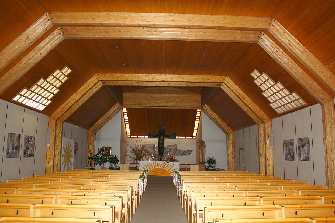 Die Innenansicht der Pfarrkirche Essling, Wien 22., Esslinger Hauptstraße.